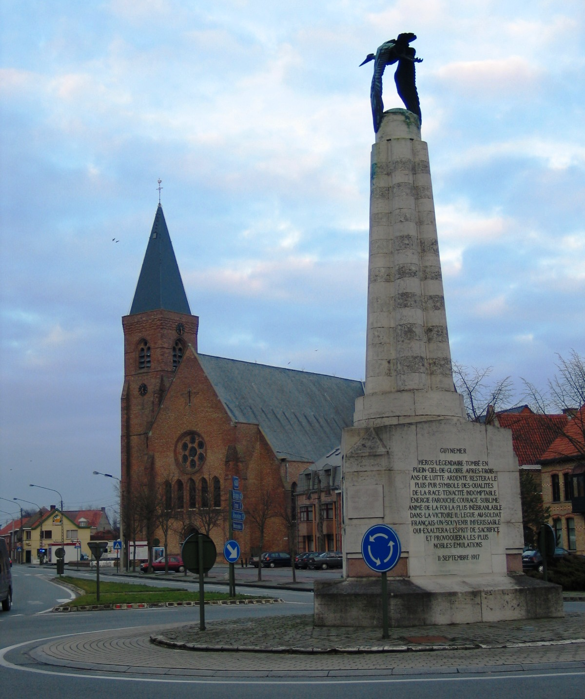 Standbeeld te Poelkapelle Georges Guynemer